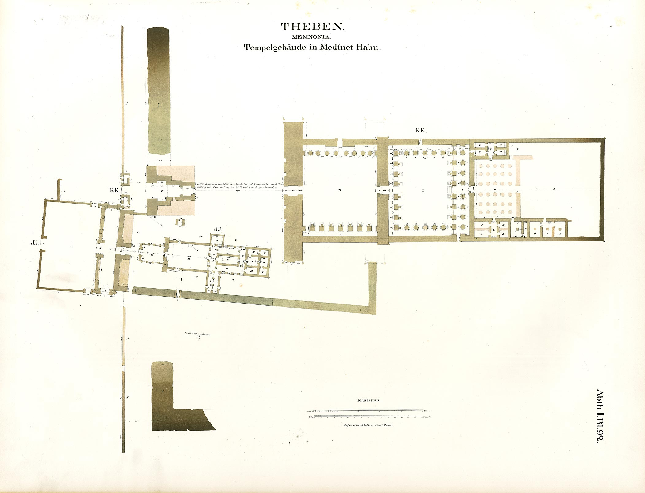 Denkmaeler aus Aegypten und Aethiopien nach den Zeichnungen der von Seiner Majestät dem Koenige von Preussen, Friedrich Wilhelm IV., nach diesen Ländern gesendeten, und in den Jahren 1842–1845 ausgeführten wissenschaftlichen Expedition auf Befehl Seiner Majestät